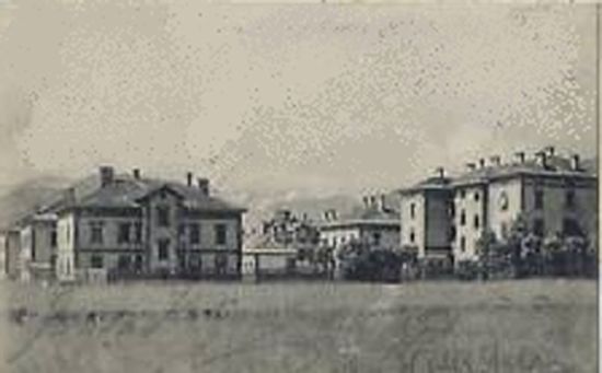 Ansicht der Jäger-Kaserne in Villach (k.u.k. Jäger-Bataillon Nr. 8)